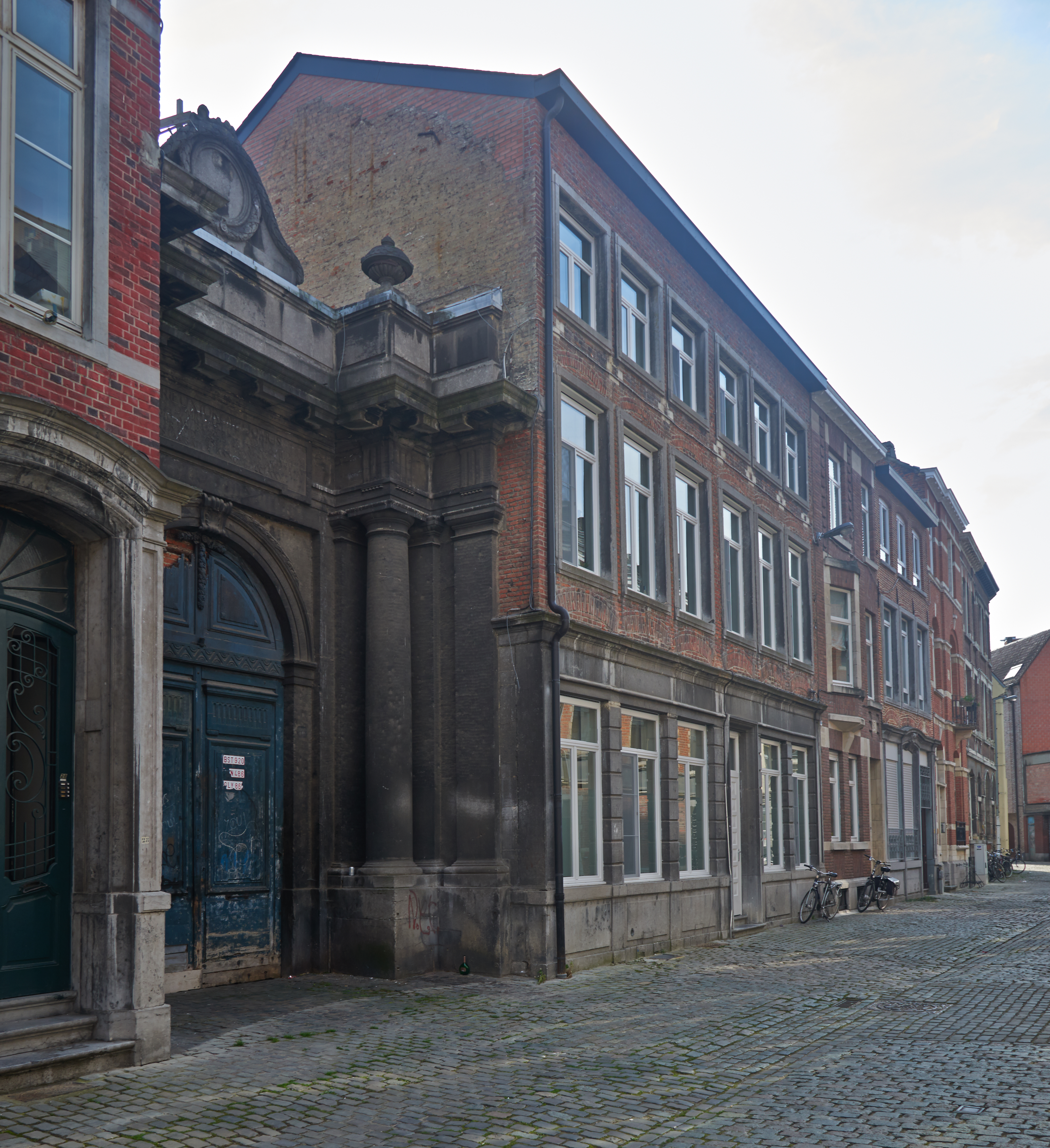 Leuven, Schrijnmakersstraat, Drieuxcollege poort links, nr 28 rechts daarvan